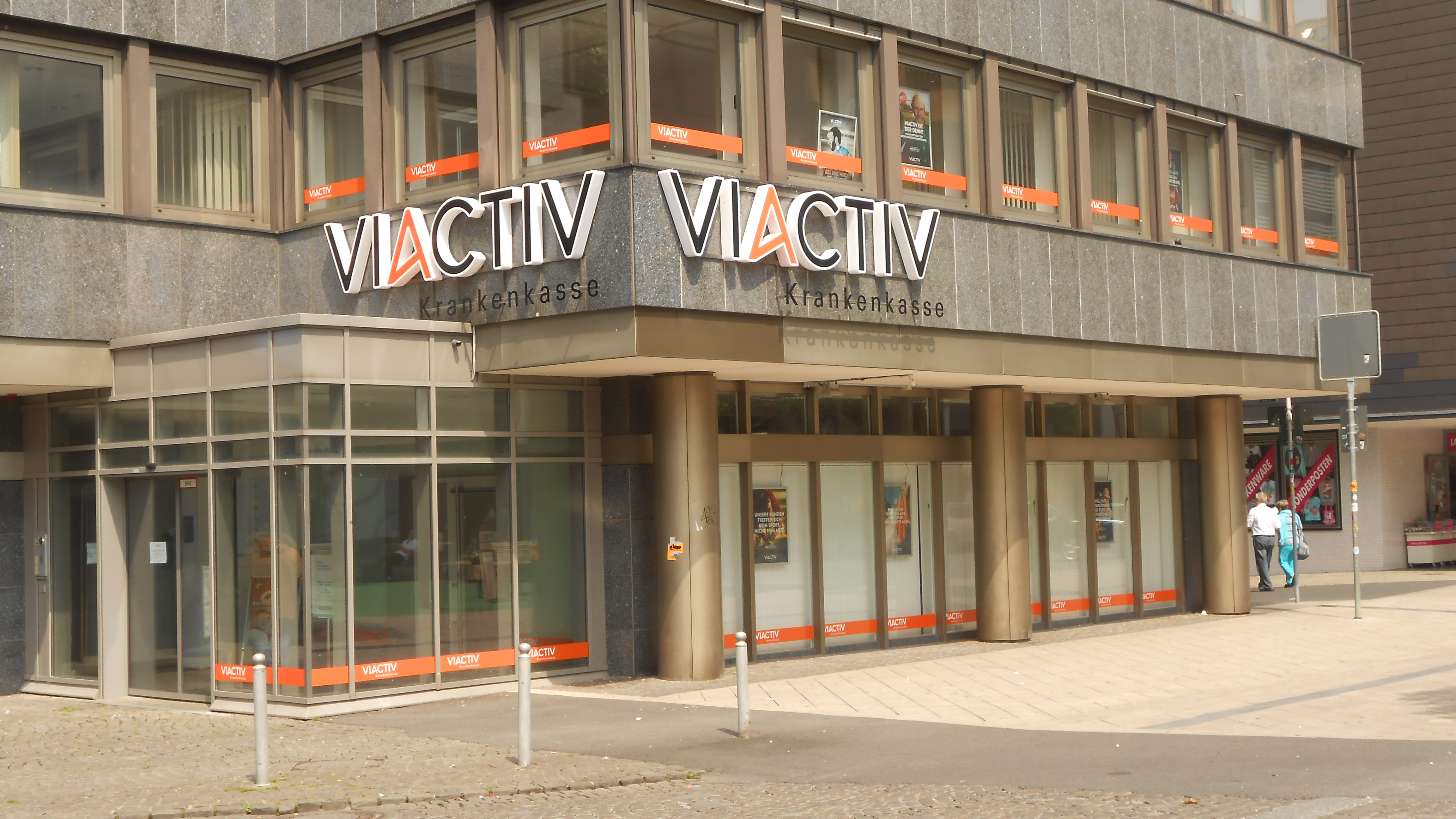 Die Viactiv Krankenkasse an der Kuckelke / Ecke Brüderweg in der Dortmunder Innenstadt (am Pylon/U-Bahn Reinoldikirche).